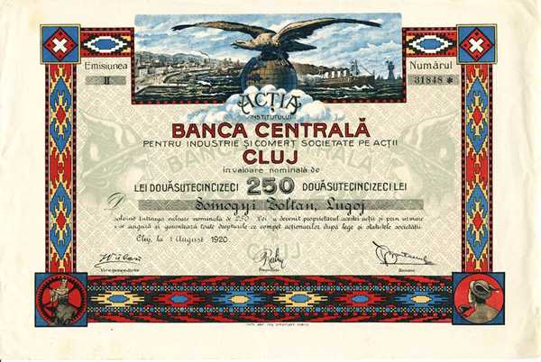 Este vorba despre scanul unei actiuni emise de o banca care nu mai exista. Actiunea are doar valoare de colectie si e de proprietatea mea.